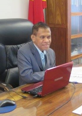 Guilhermino da Silva, Präsident des Tribunal de Recurso de Timor-Leste